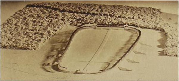 Modell des Reichsthingplatzes Bückeberg aus dem Jahre 1934 Dieses Albert Speer zuzuschreibende Modell sieht neben einem mächtigen steinernen umlaufenden Wall vor, dass ebenfalls die beiden Tribünen und die breite